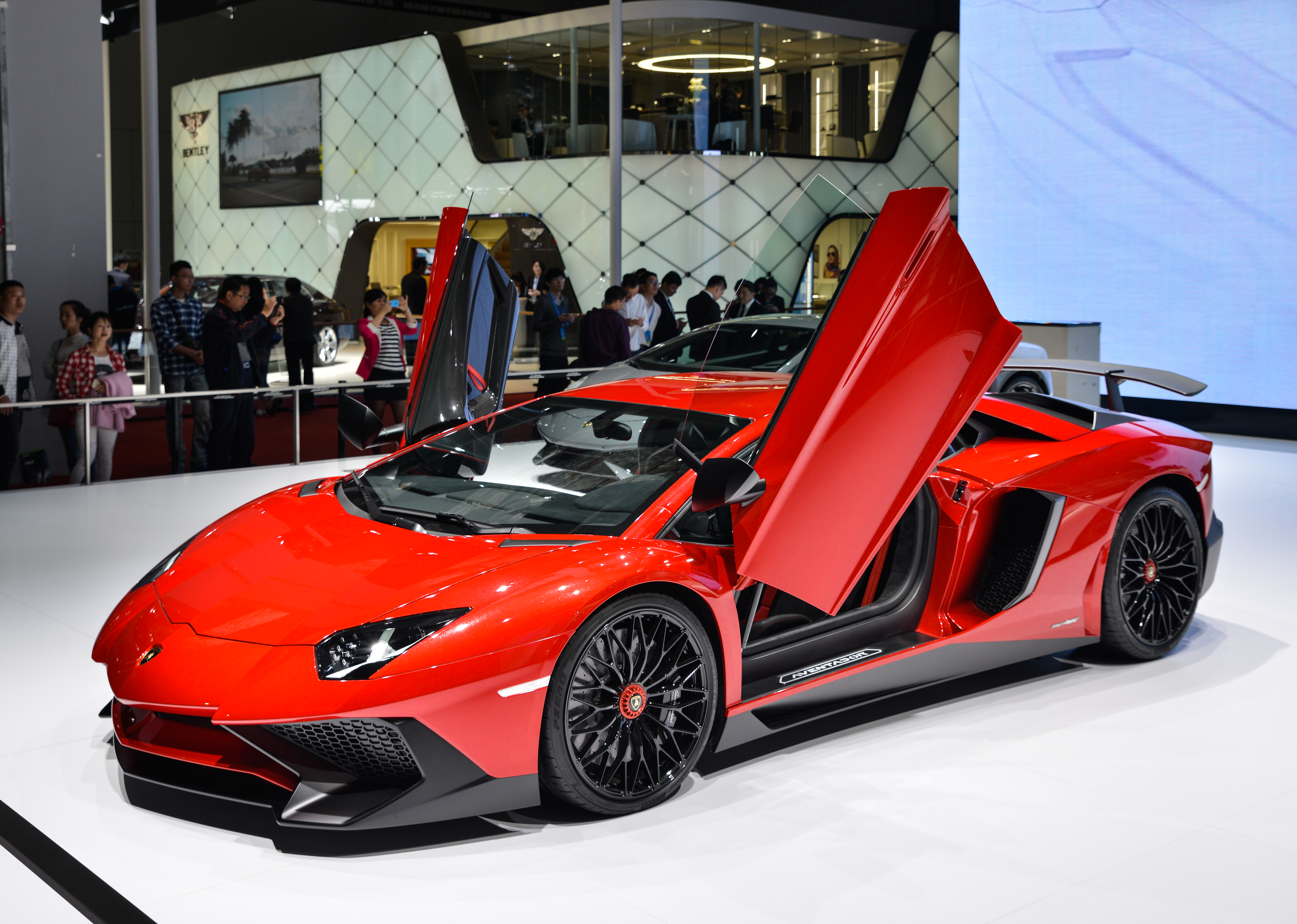 Lamborghini Aventador LP 750-4 Super VELOCE Auto Shanghai 2015